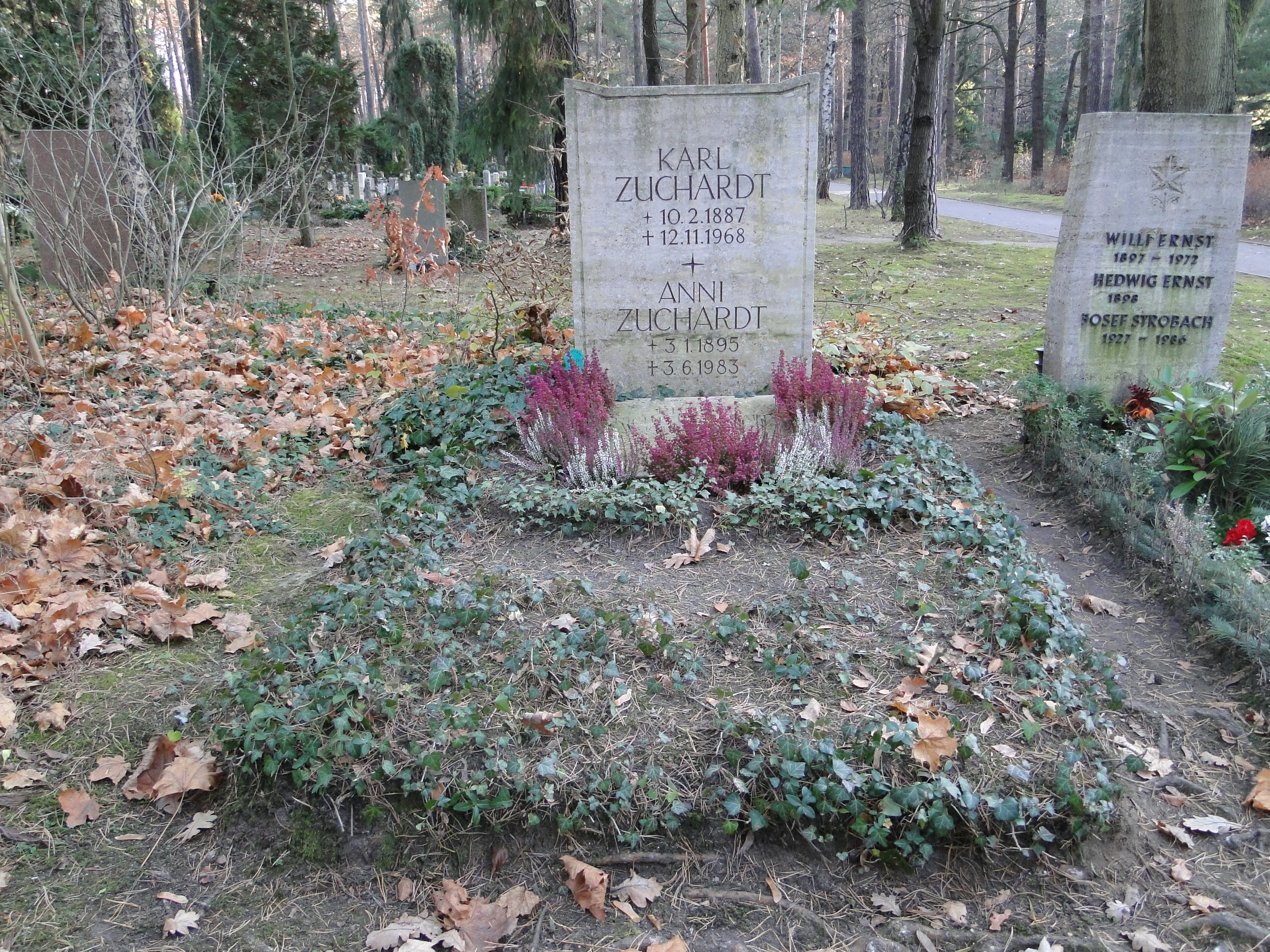 Grab des deutschen Schriftstellers Karl Zuchardt auf dem Heidefriedhof in Dresden